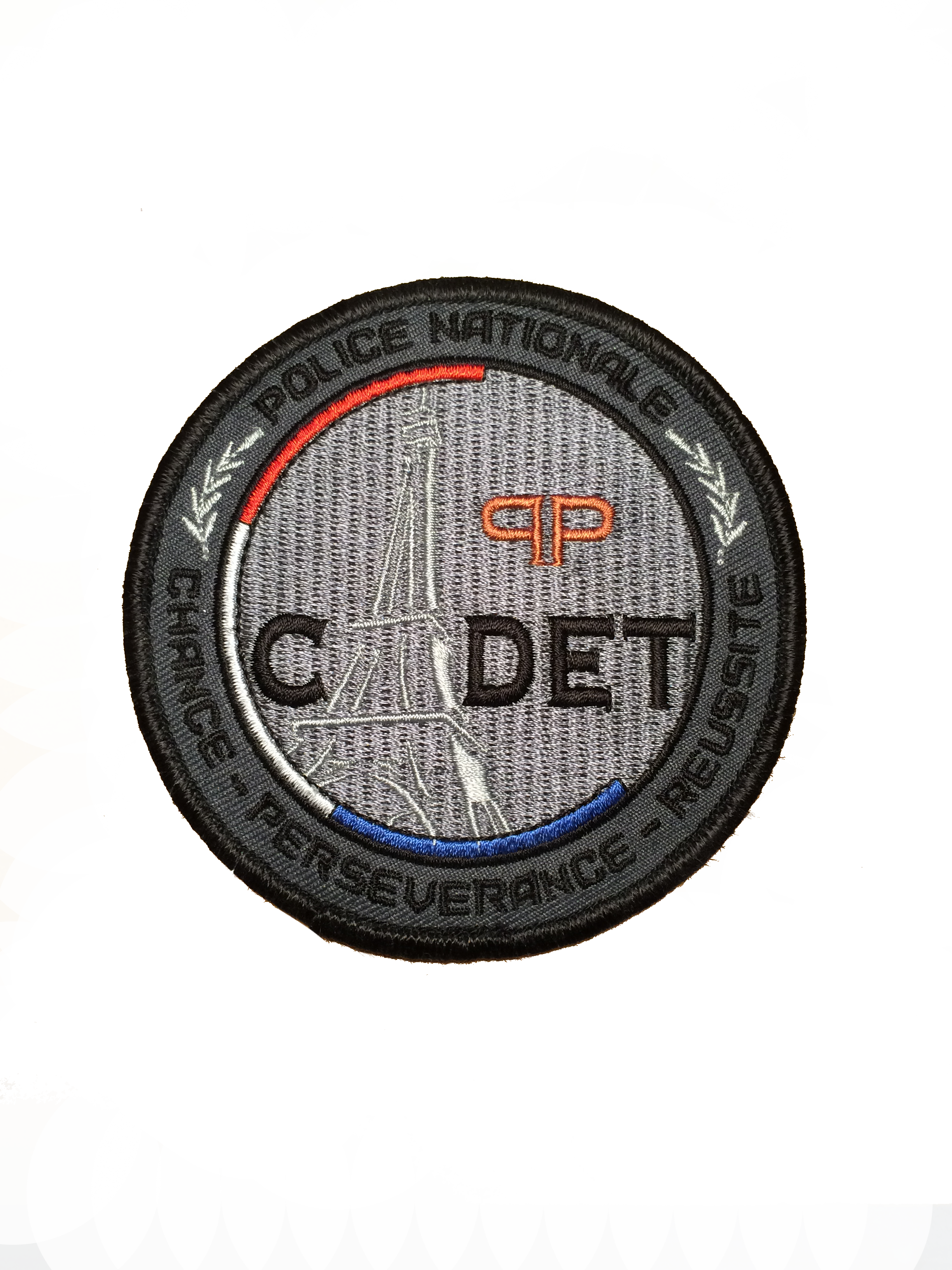 L'écusson des cadets de la Republique de la Préfecture de Police de Paris